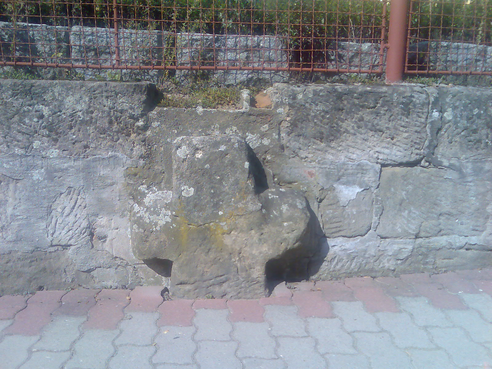 smírčí kříž zazděný v opěrné zdi v Českolipské ulici v Dubé A geocoded location could be added to this image. Visit Commons:Geocoding for information on how to add coordinates. Beta-test: Add coordinates helps to determine coordinates.